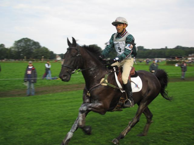 L'adjudant chef Gilles Viriciel sur Black Ring*Mili aux jeux équestres mondiaux de 2006 sur l'épreuve de cross du concours complet. Il termine à la 20e position.